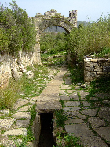 Aspendos